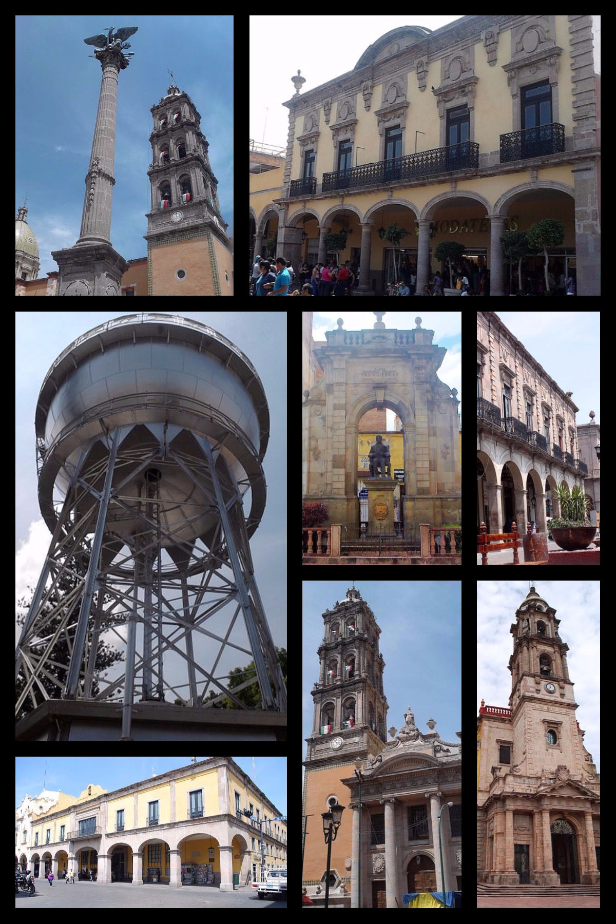 Celaya